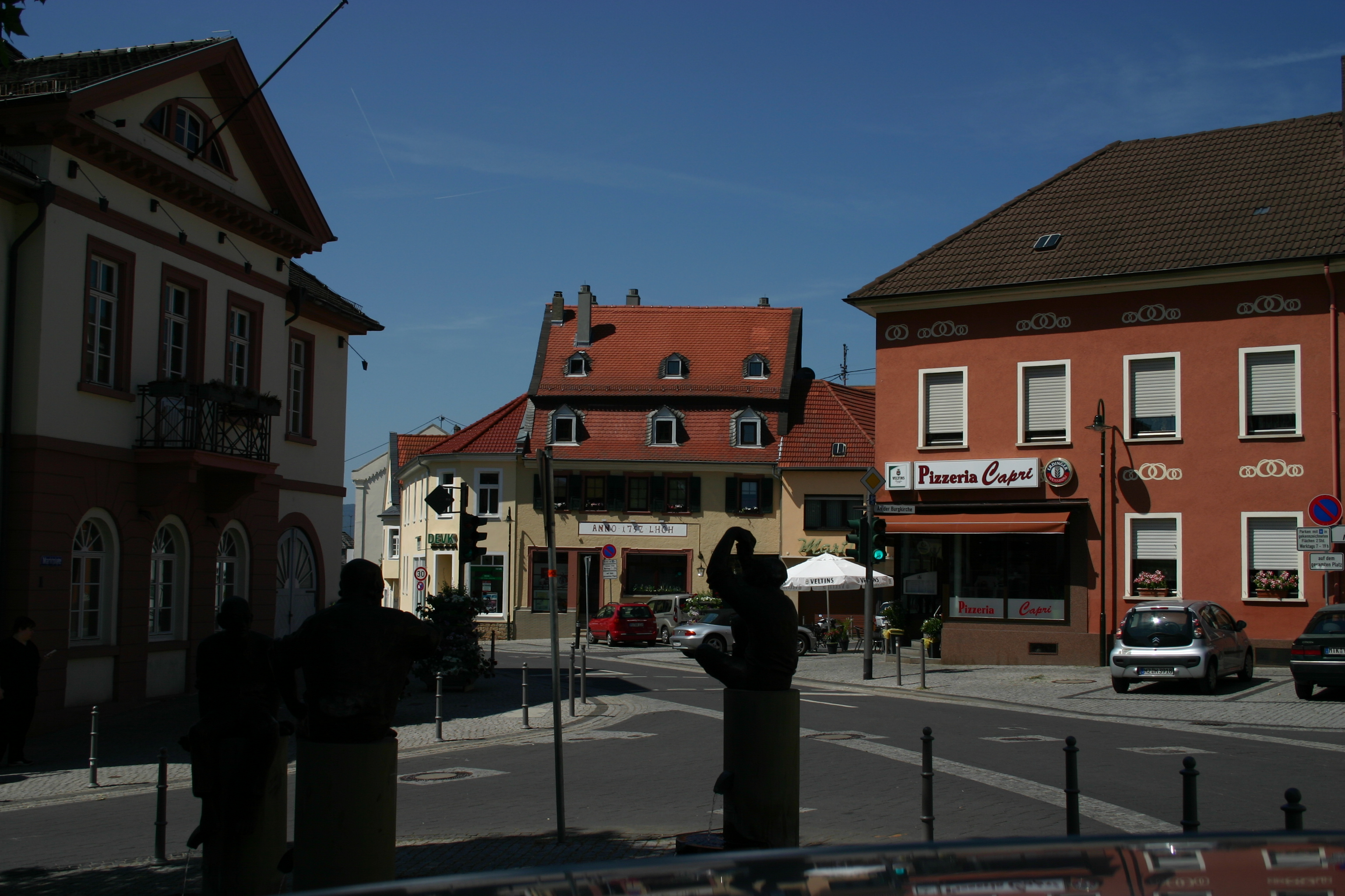 Rathaus mit Brunnen und im Hintergrund die nördliche Bebauung des Marktplatzes in Ober-Ingelheim